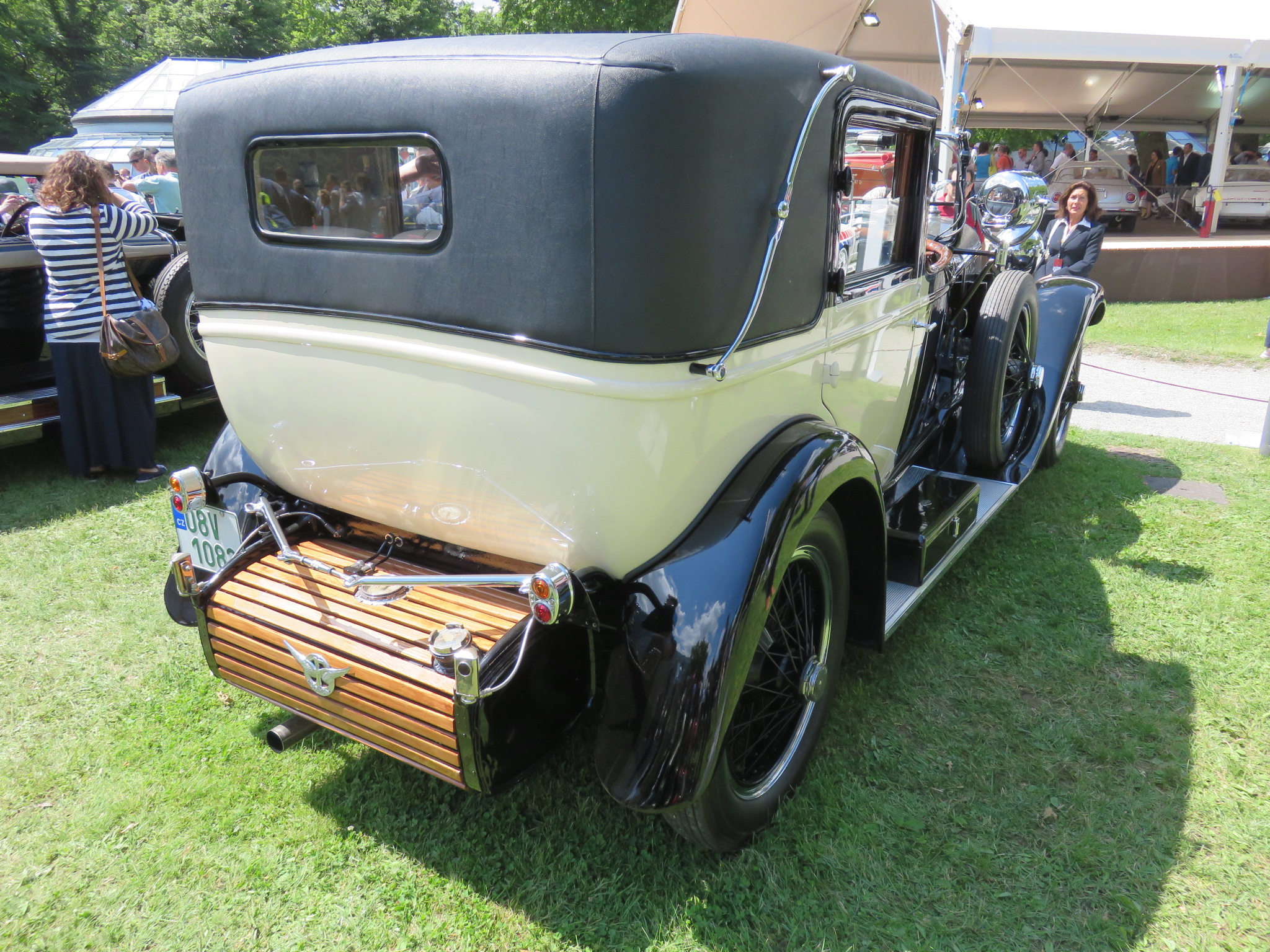 Farman A6B Coupé de Ville Million-Guiet, 1925, concours d'élégance Villa d'Este 2015